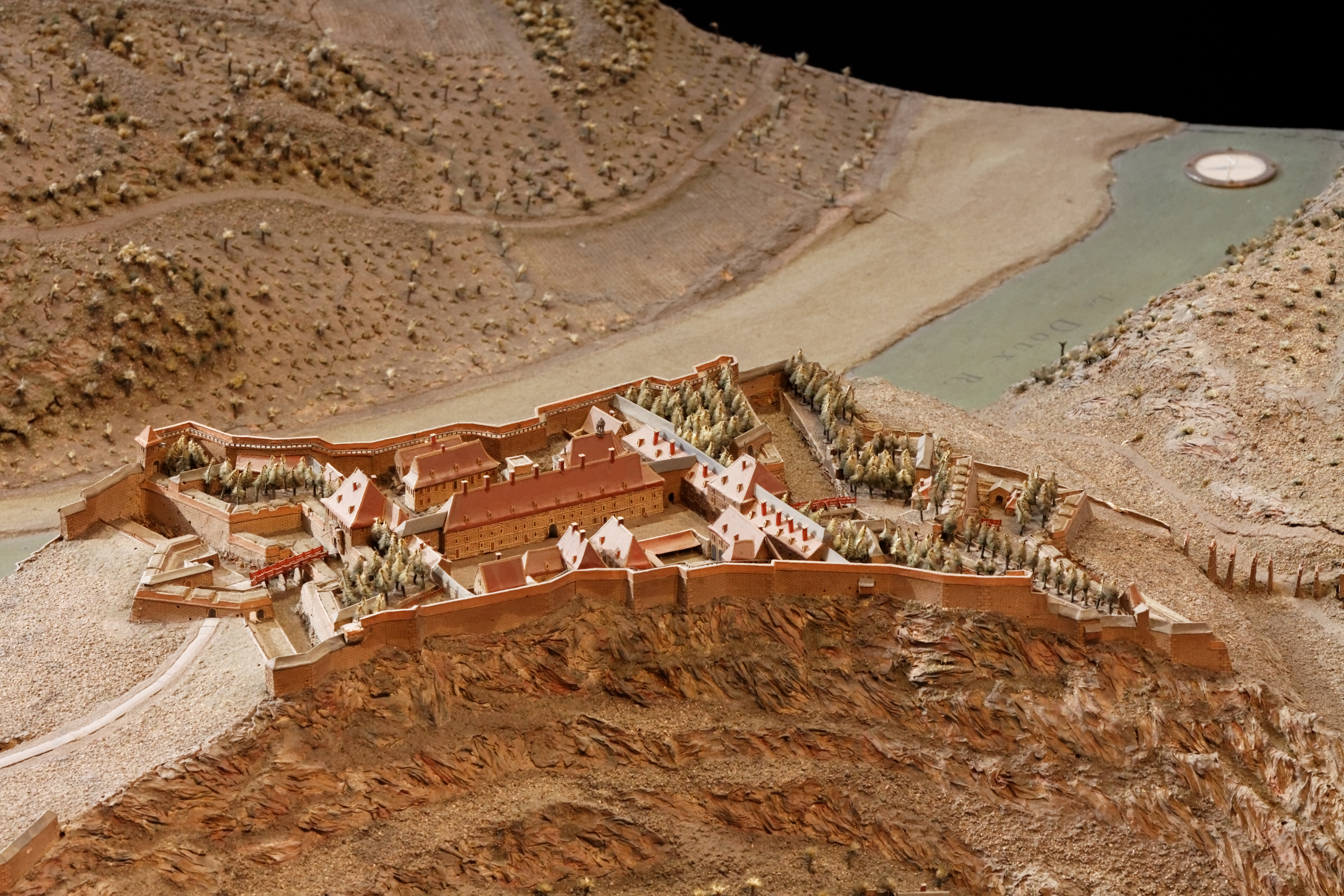 Plan-relief de Besançon en 1722. Plan-relief construit de 1720 à 1722 sous la direction de l'ingénieur Ladevèze. Échelle 1/600e